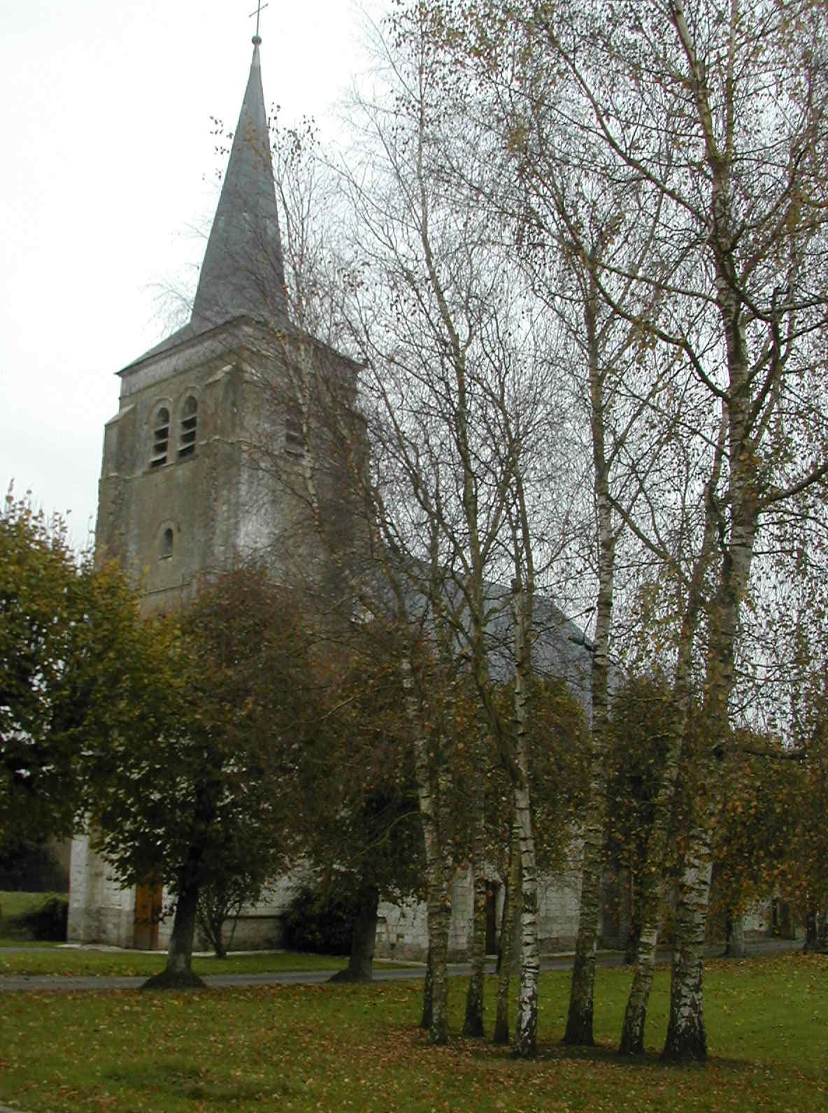 L'église d'Averdoingt. .